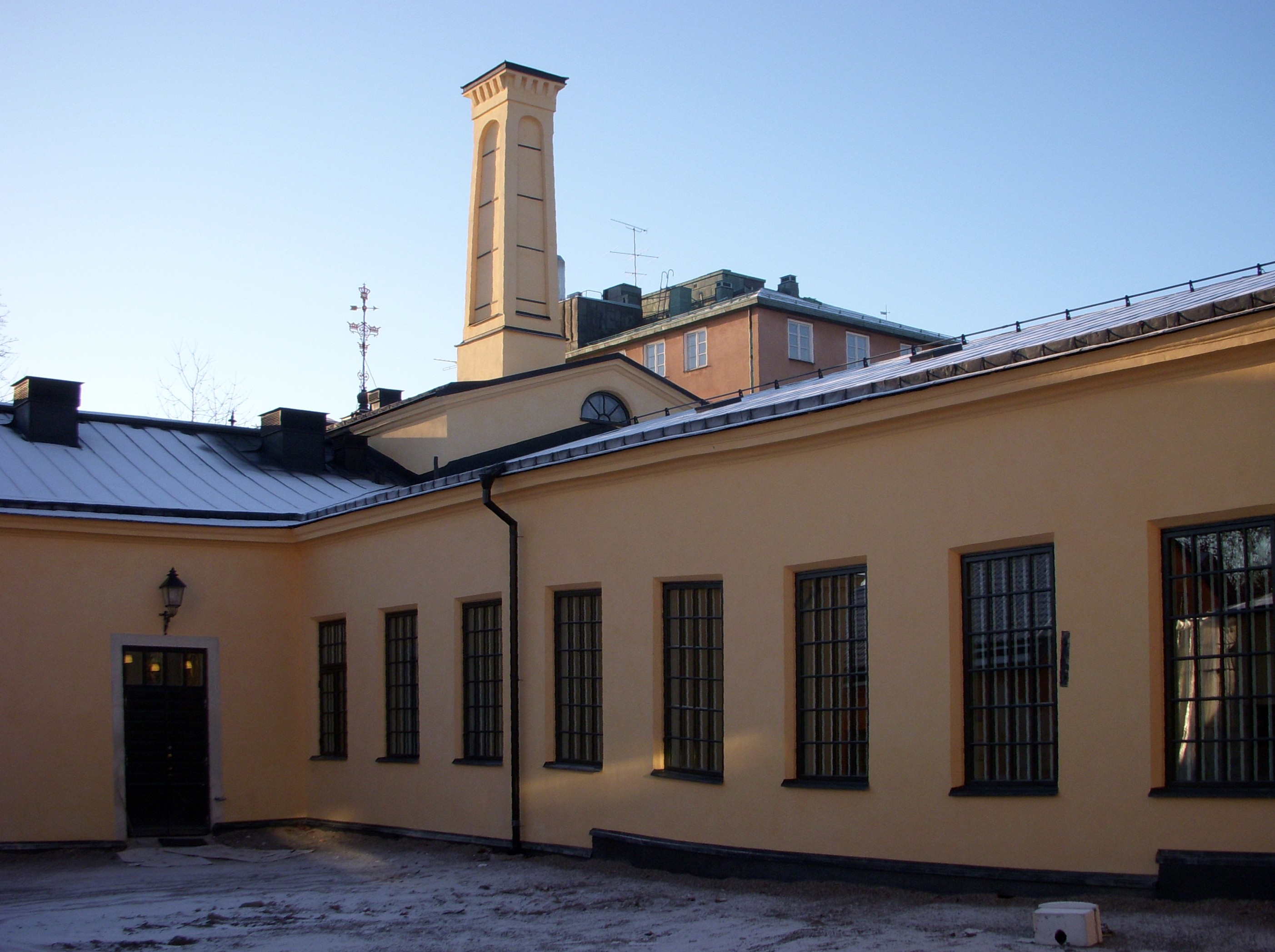 Kungliga Myntet i Stockholm, Kungsholmen